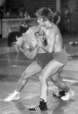 Gholam Reza Kassoob vs Kazimierz Lipień